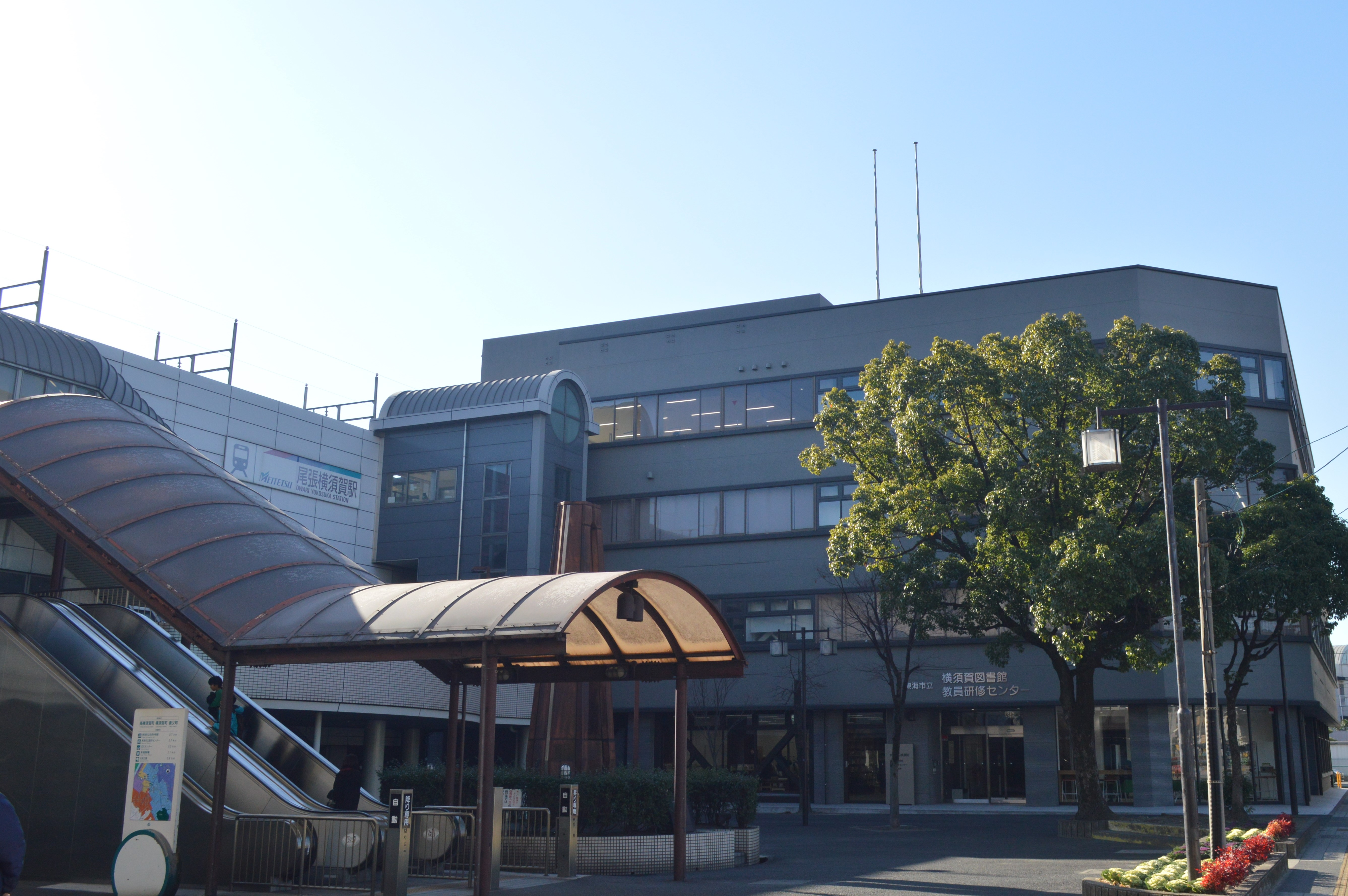 愛知県東海市に「まなぶん横須賀」（右）と名鉄常滑線尾張横須賀駅（左）。東海市立横須賀図書館が入っている。